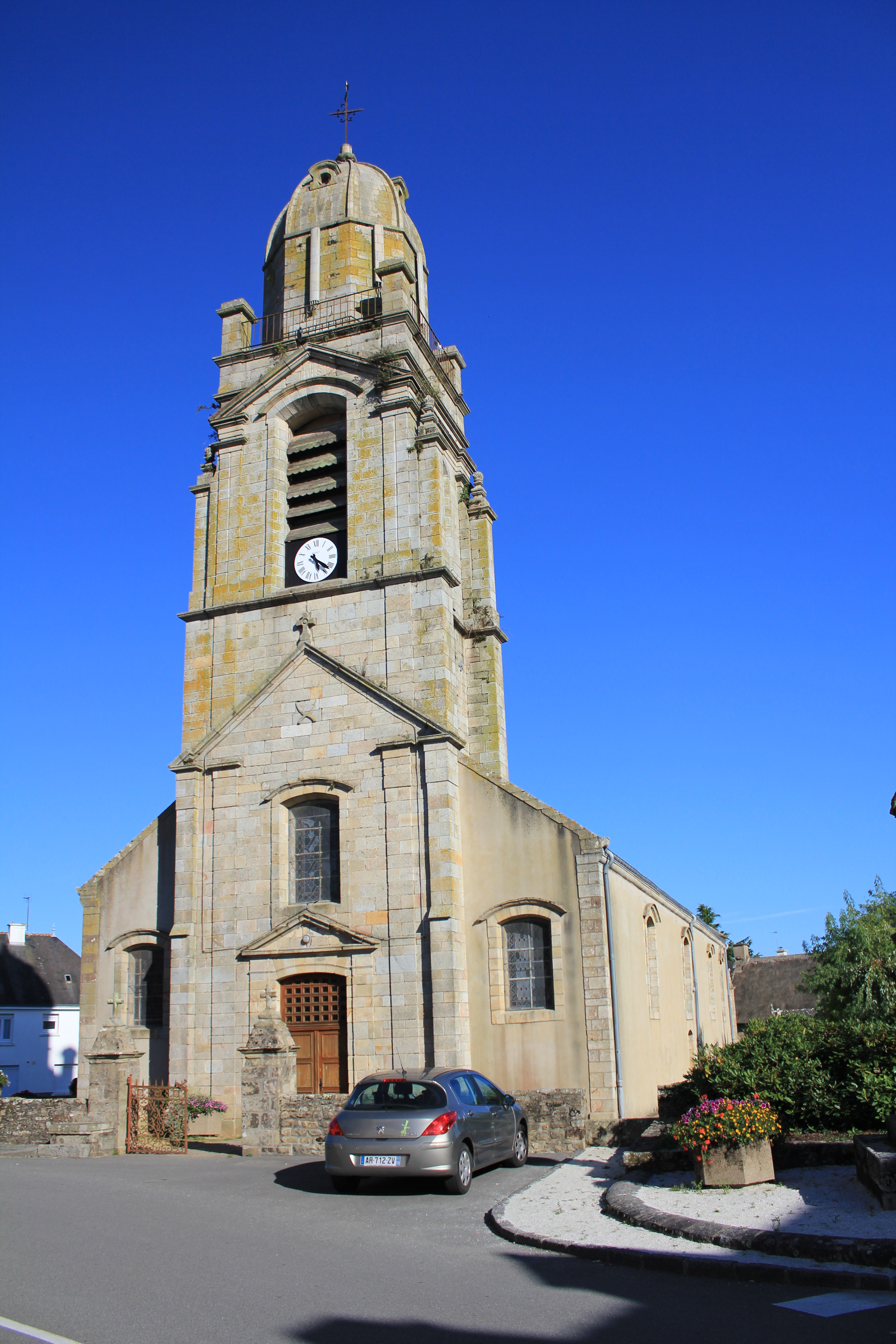 église Saint-André (Brech)